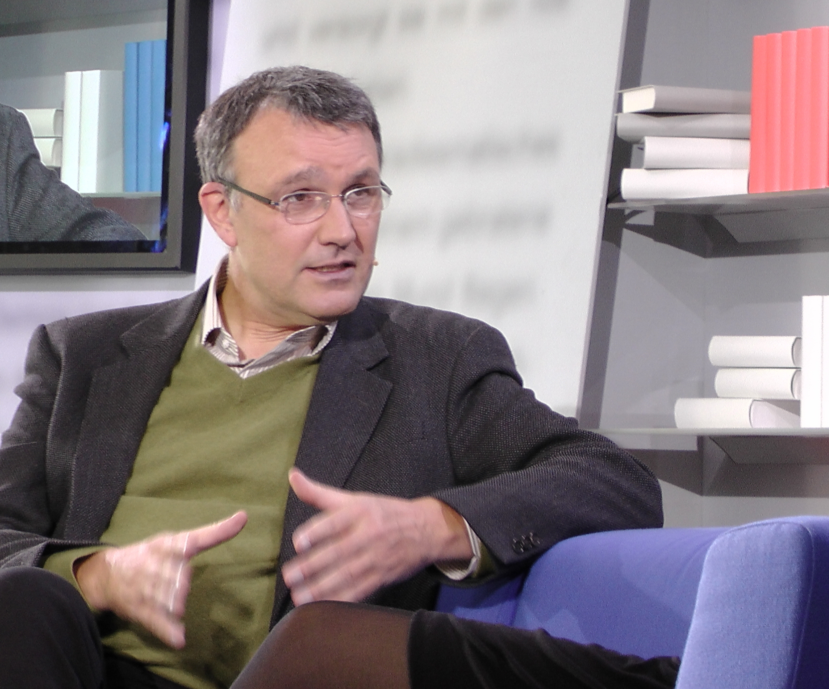 Michael Lüders im Gespräch mit Marie Sagenschneider, das blaue Sofa / Club Bertelsmann Dieses Fotos dürfen Sie honorarfrei nutzen, wenn Sie folgenden credit beachten: Copyright: Das blaue Sofa / Club Bertelsmann